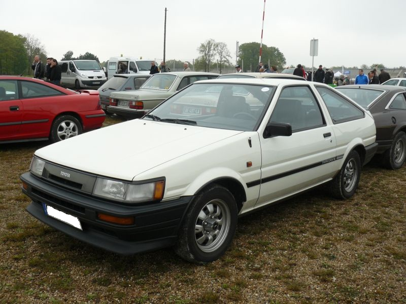 Français cadien: Montlhery Avril 2012